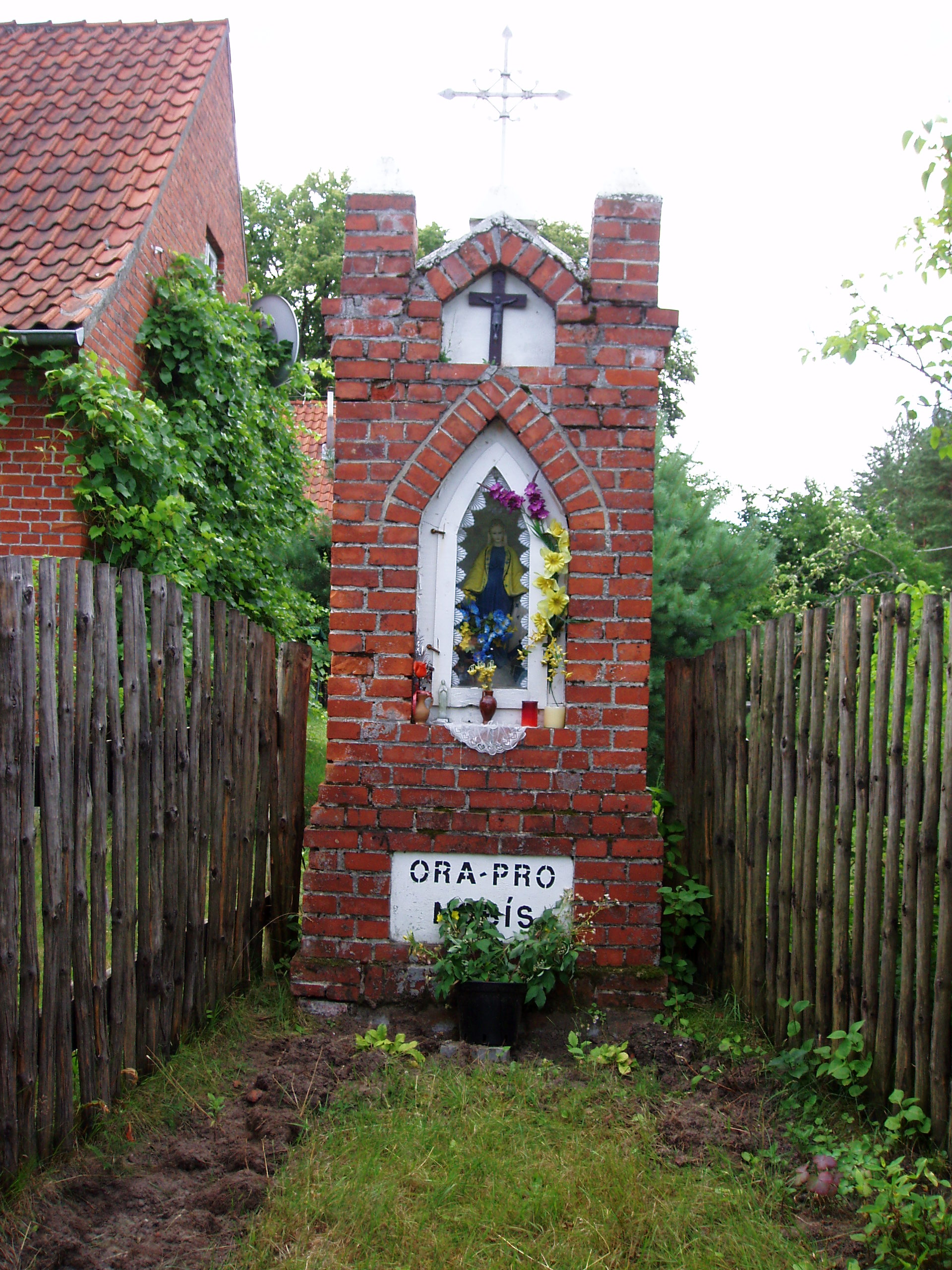 Kapliczka w Kopankach.